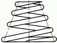 ressort conique à vide Jean-Jacques MILAN 23:20, 12 Dec 2004 (UTC)